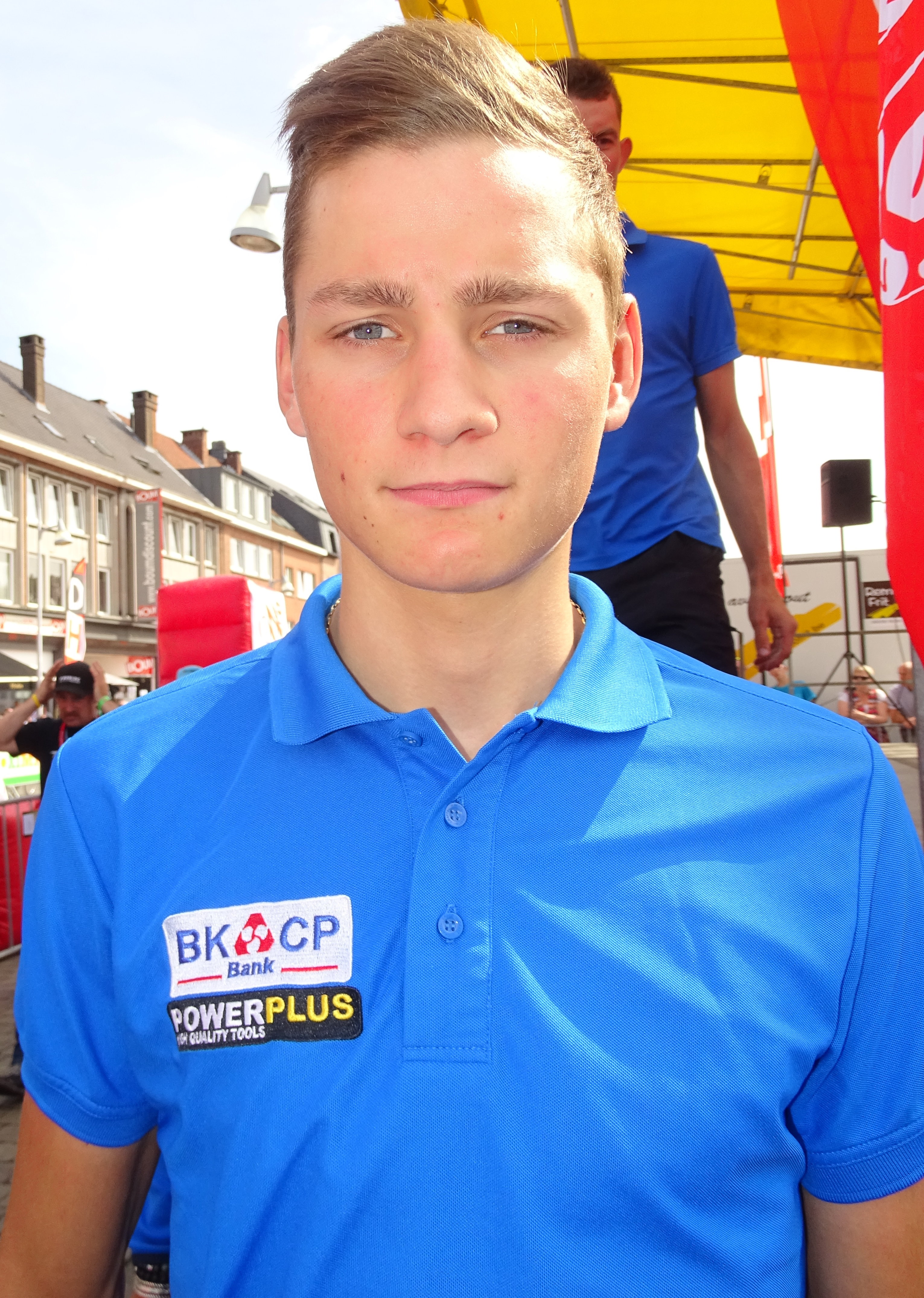 Reportage réalisé le mercredi 22 juillet à l'occasion du départ du Grand Prix Pino Cerami 2015 à Saint-Ghislain, Belgique.